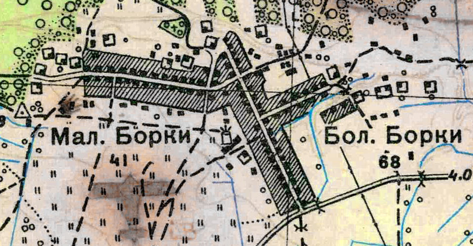 Топографическая карта Ленинградской области, квадрат О-35-11-Б-б (Лебяжье), деревня Борки.